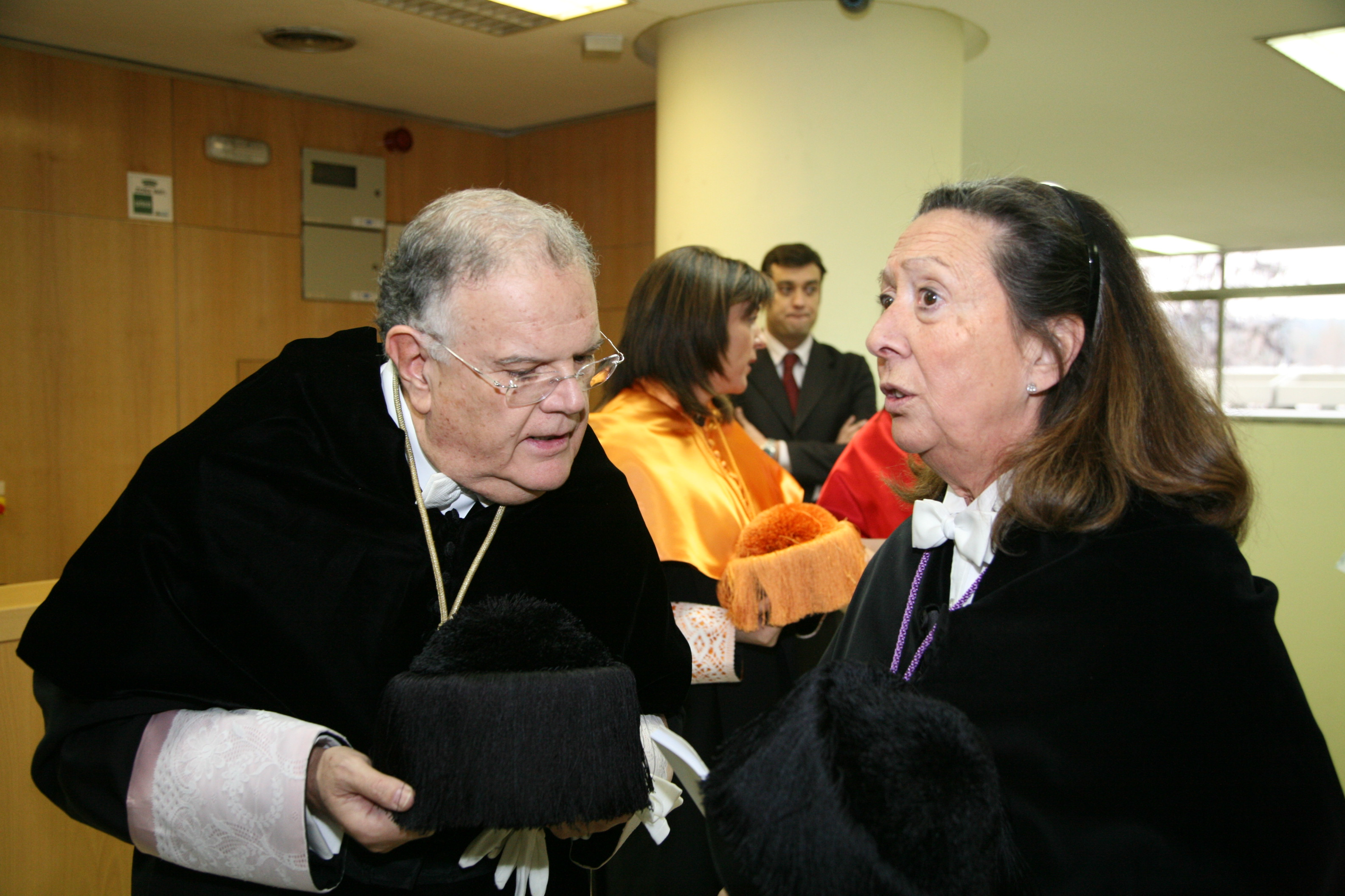 Rectores honoríficos de la UNED: Mariano Artés Gómez (1987-1995) y Araceli Maciá Antón (2001-2005)